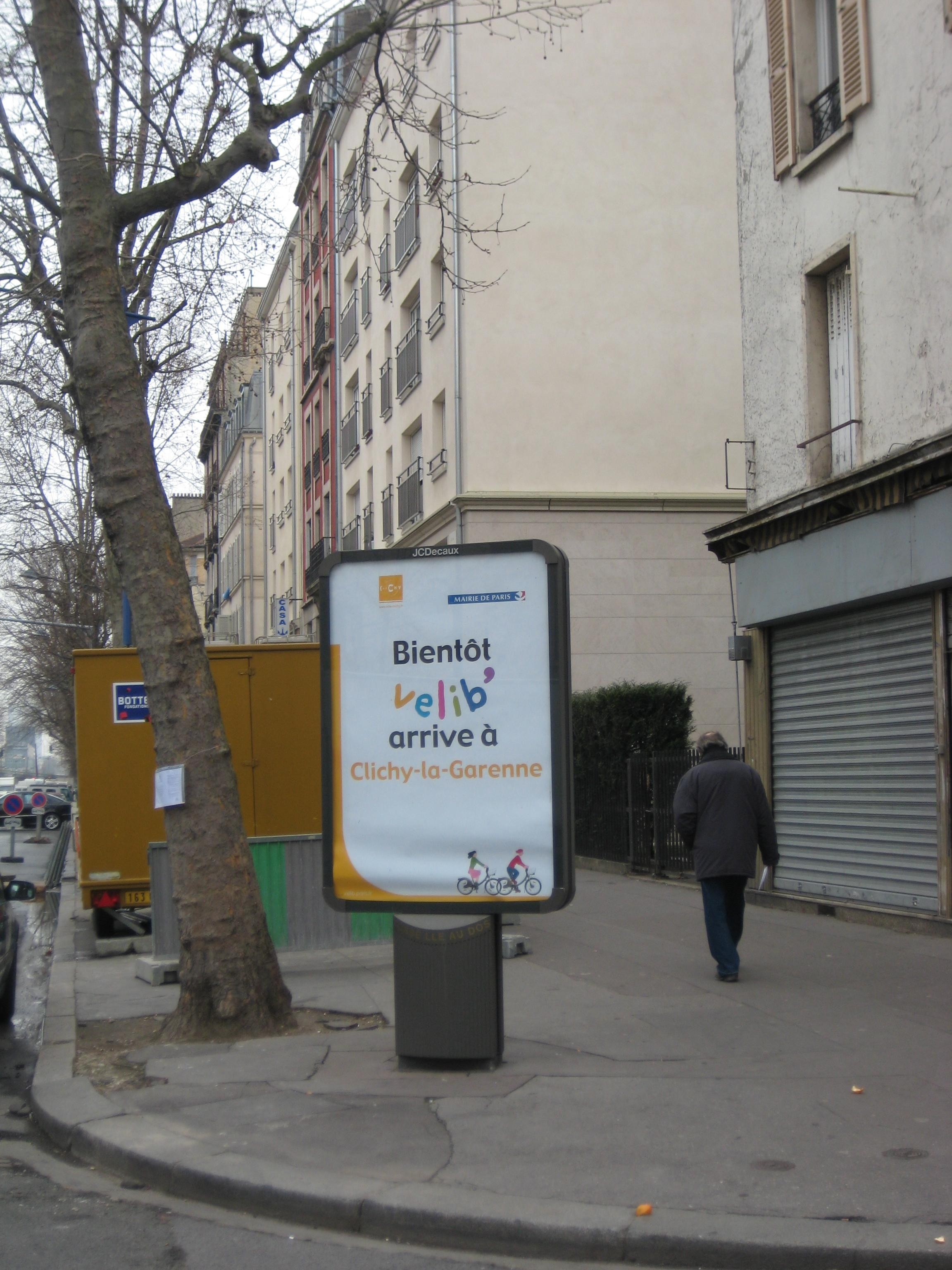 Panneau indiquant l'arrivée future du système Velib' à Clichy-la-garenne.